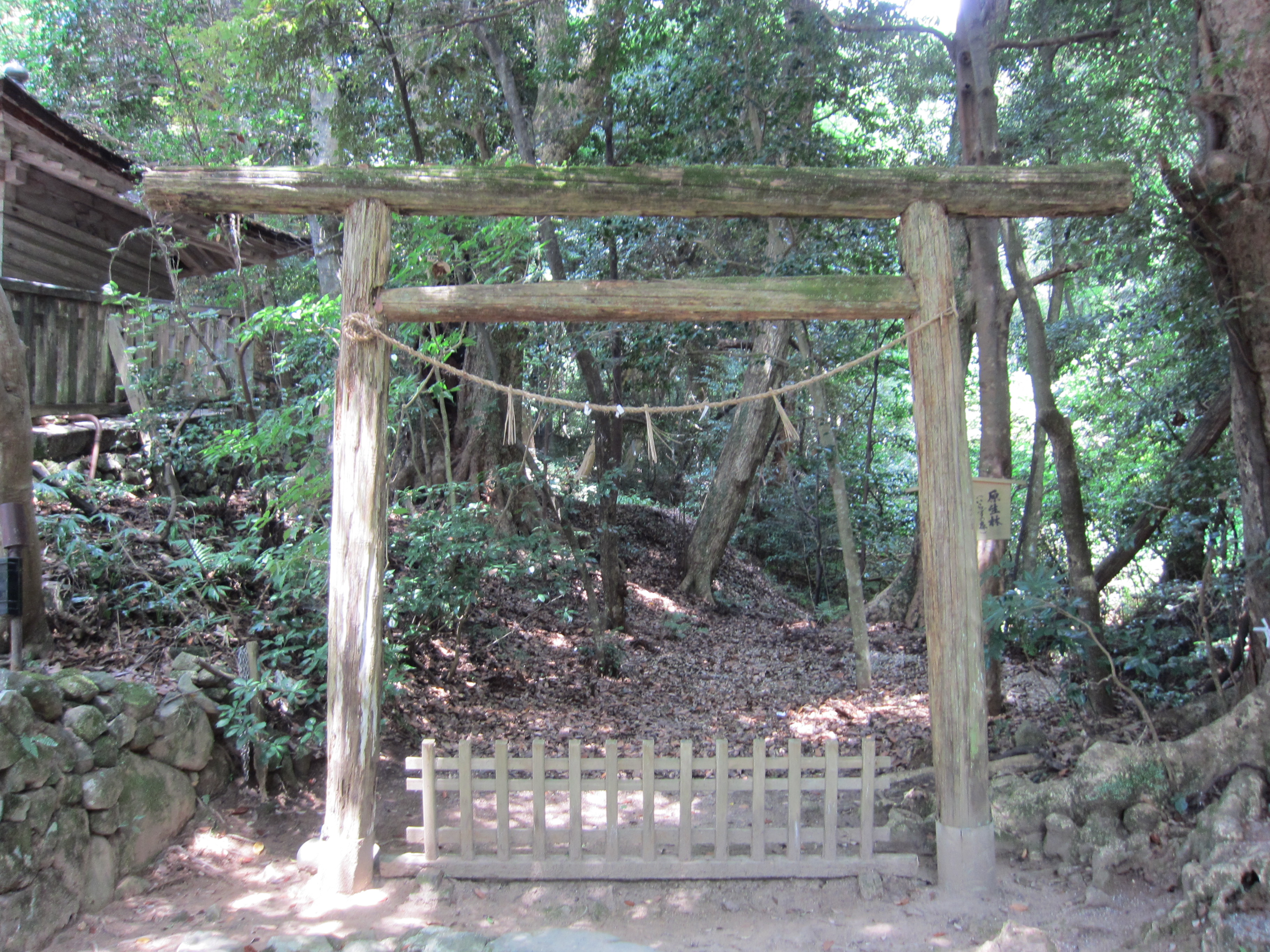 楊田神社 (氣多大社摂社)